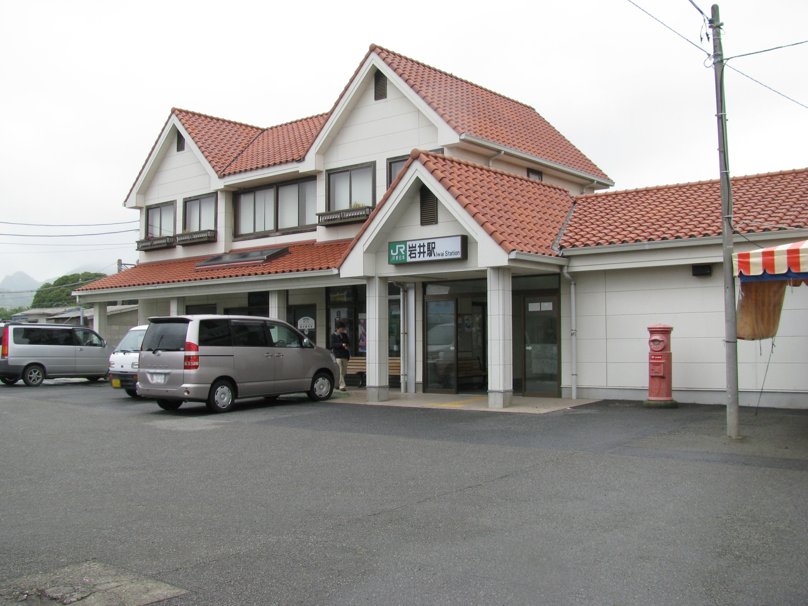 内房線岩井駅